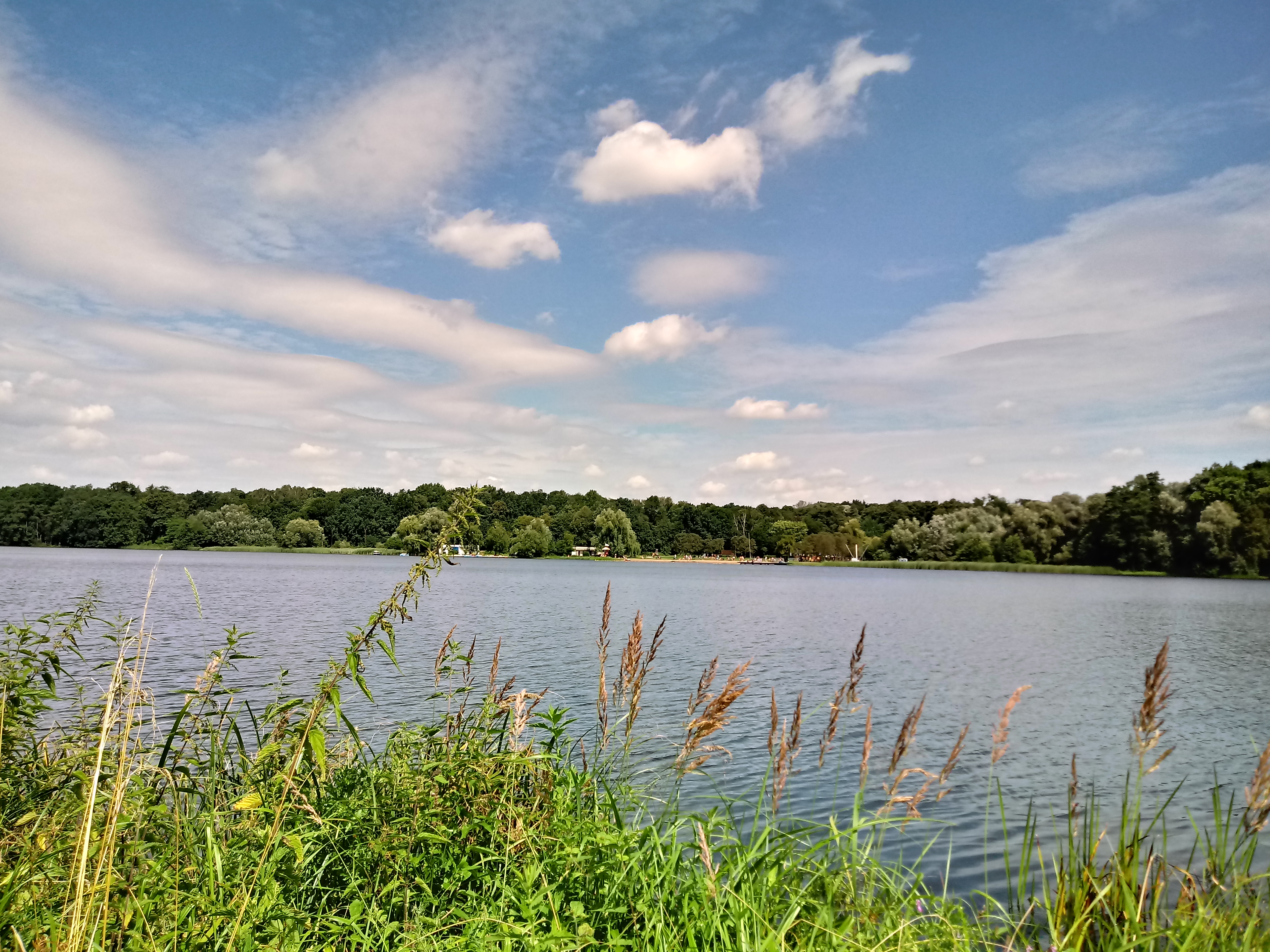 Jezioro Rusałka w Poznaniu.